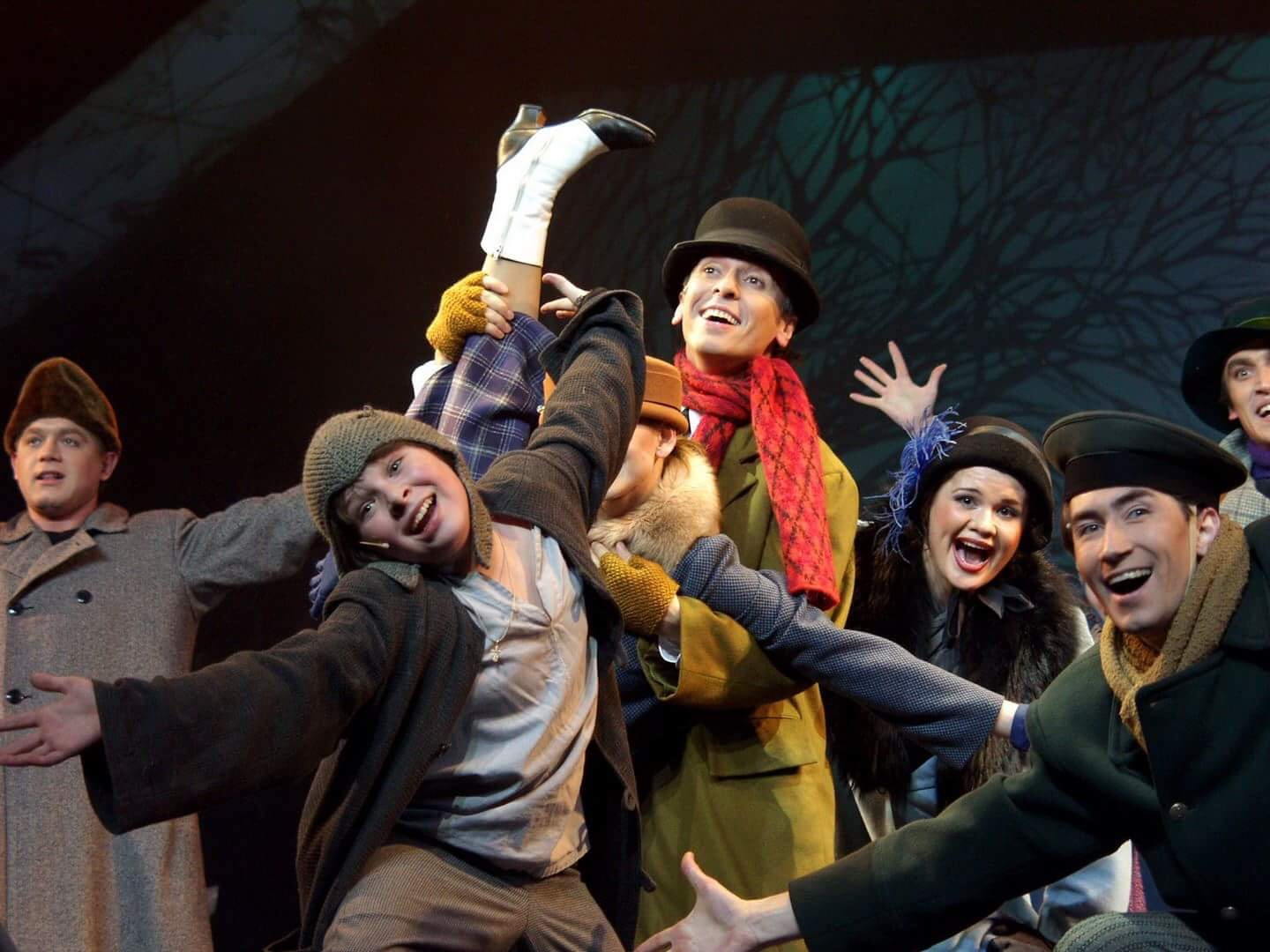 Сцена "Блошиный рынок" в мюзикле "Норд-Ост"